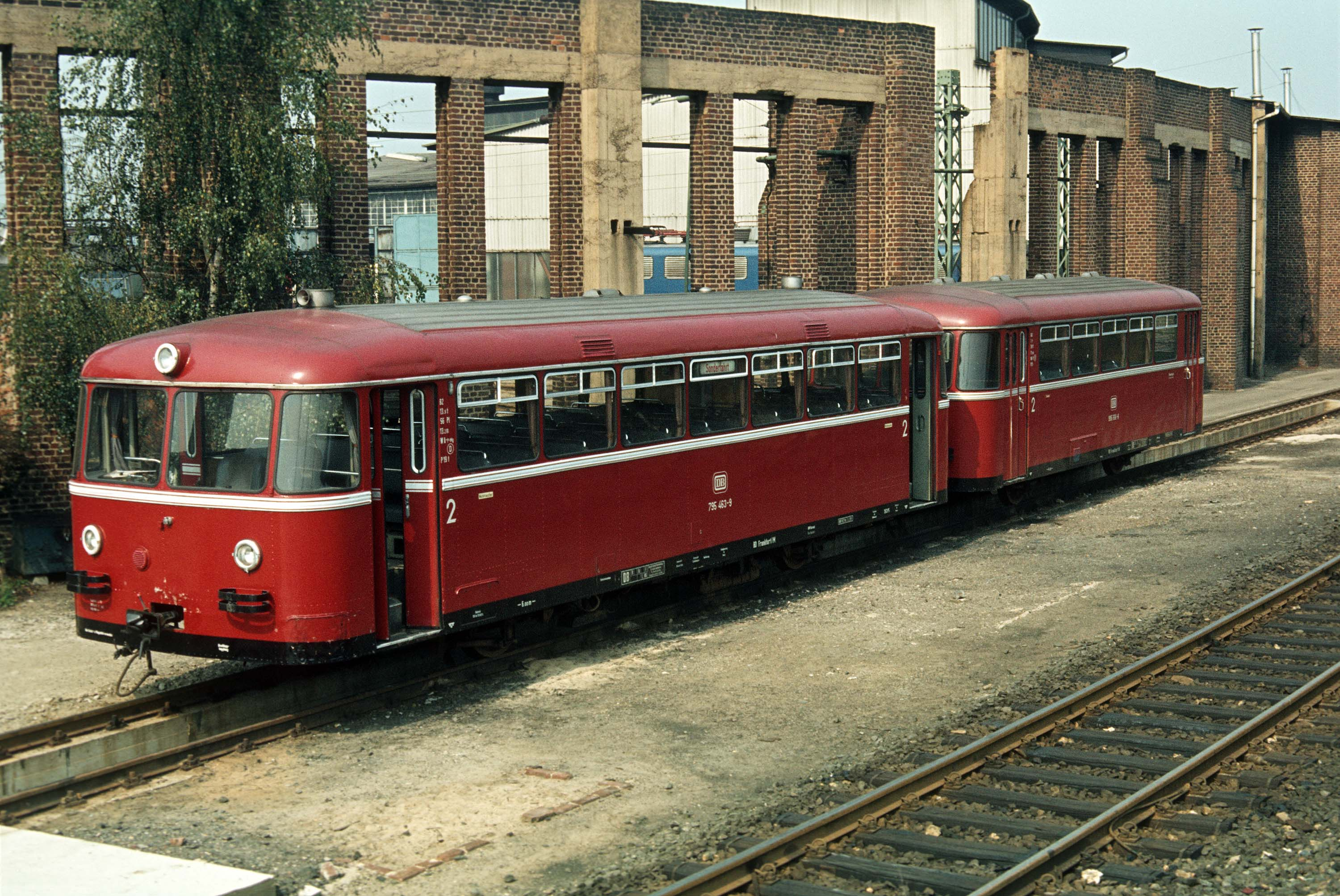 Schienenbus der Baureihe 795 (VT 95), 795 463-9 im Bahnbetriebswerk Gießen, August 1978